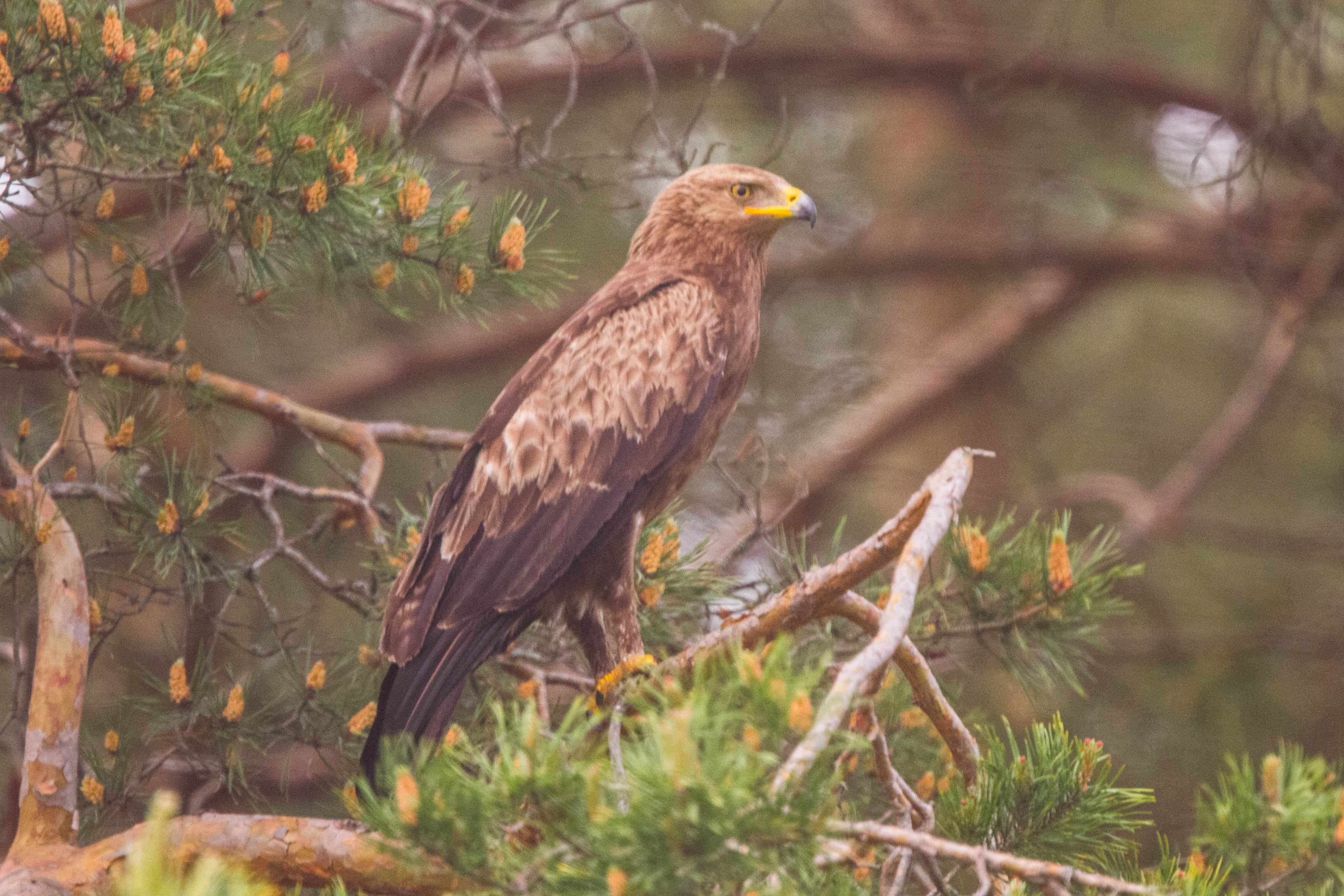 Lesser Spotted Eagle Clanga pomarina, Belarus